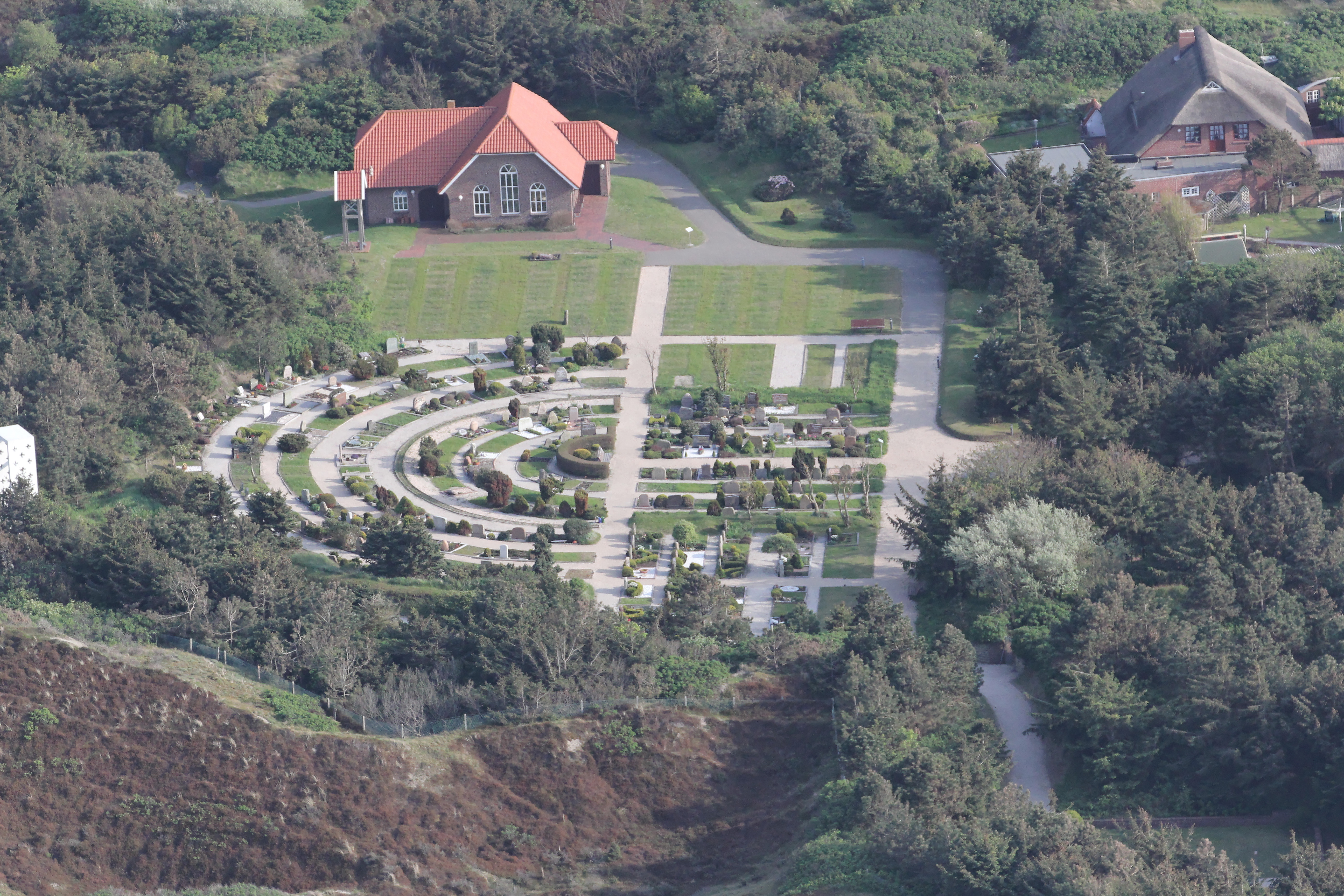 Luftaufnahme des Dünenfriedhofs Langeoog, Blickrichtung Süd.